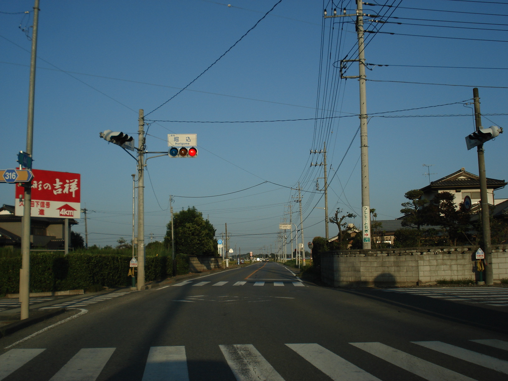 栃木県道44号栃木二宮線、316号真岡筑西線 堀込交差点（栃木県芳賀郡二宮町堀込）